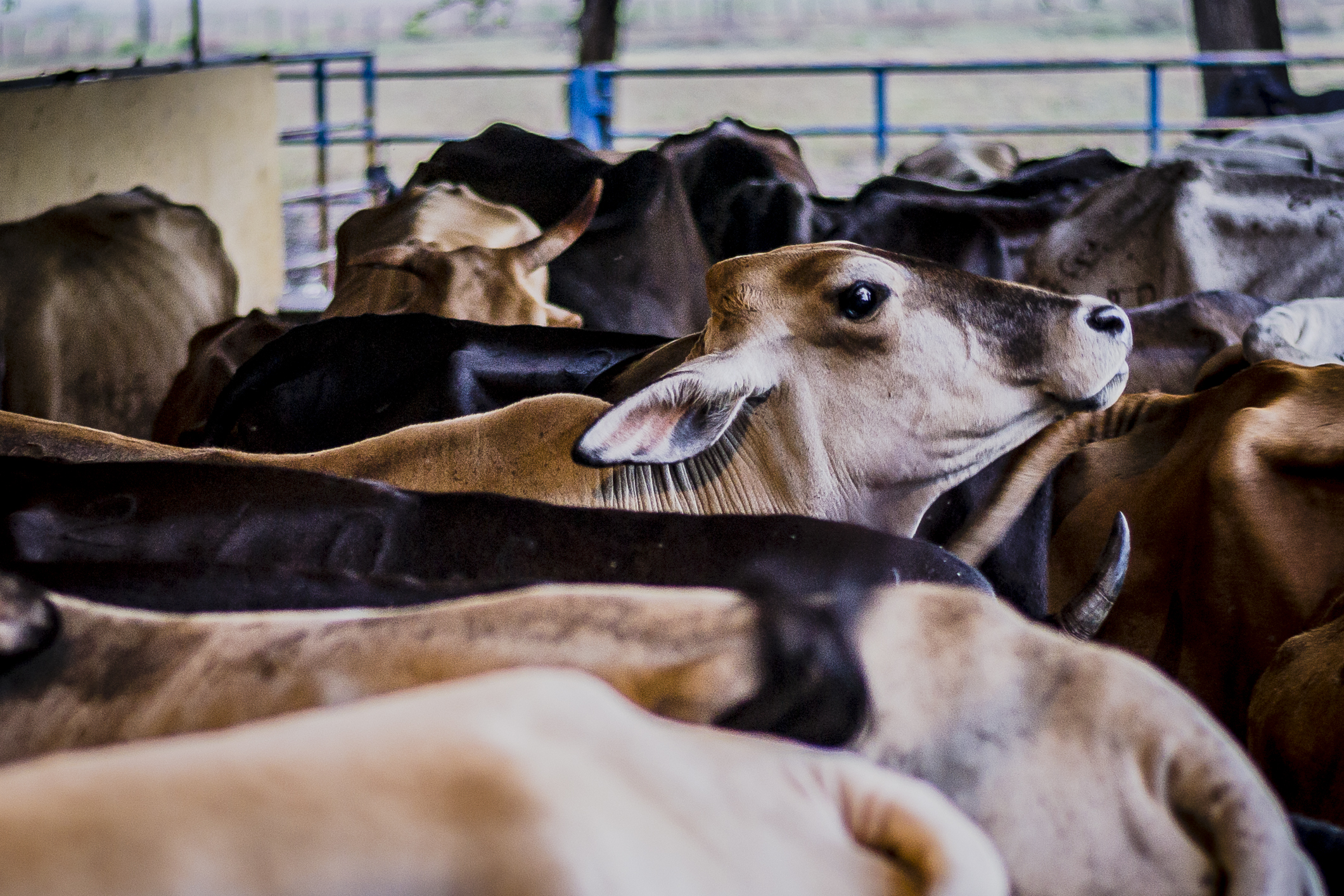 Barinas, Venezuela